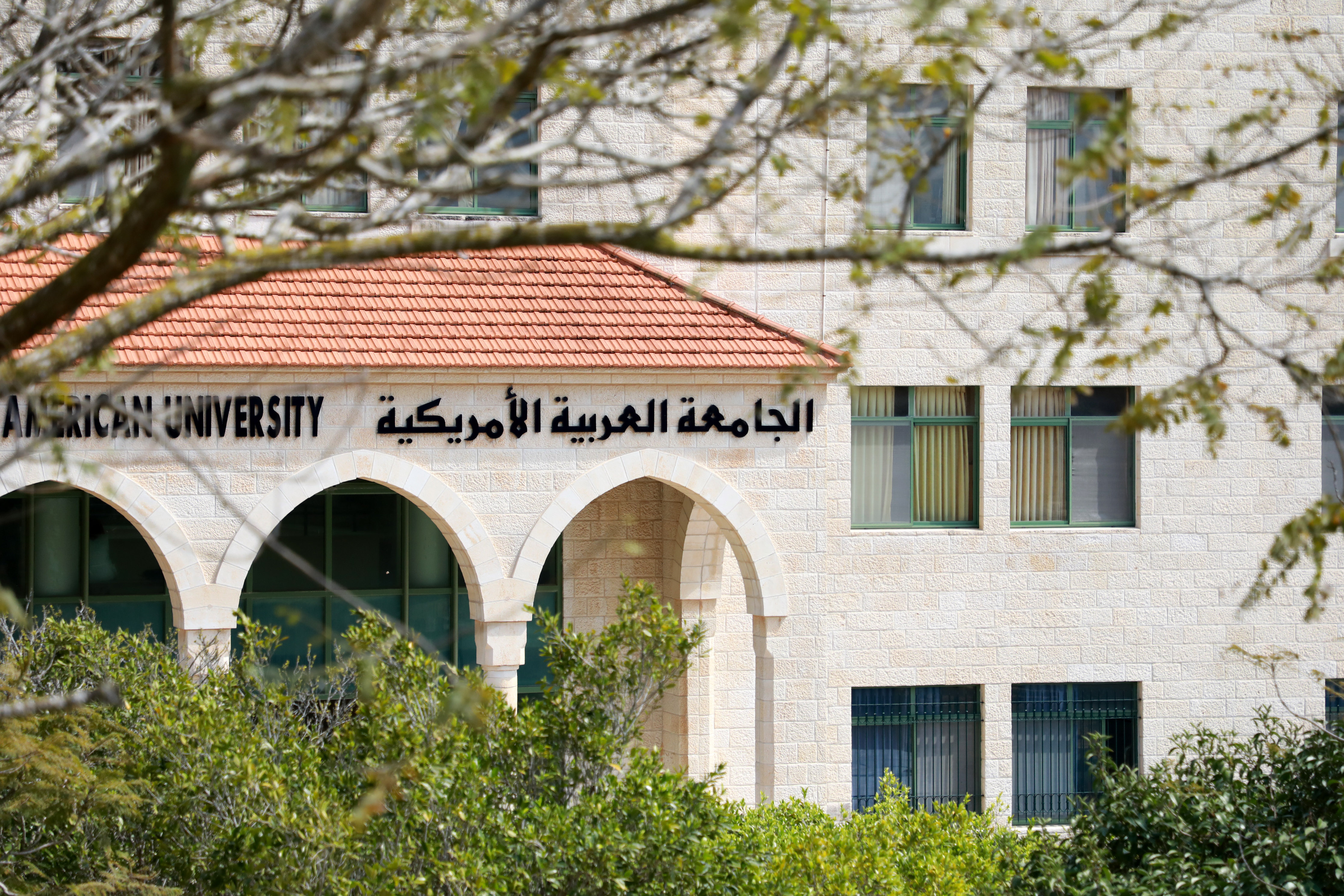 كلية الآداب - الجامعة العربية الأمريكية